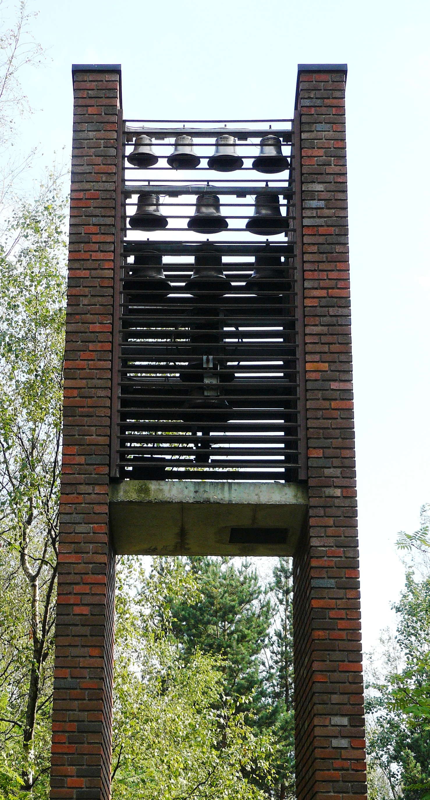 Rødtvet kirke - bell tower in churchyard